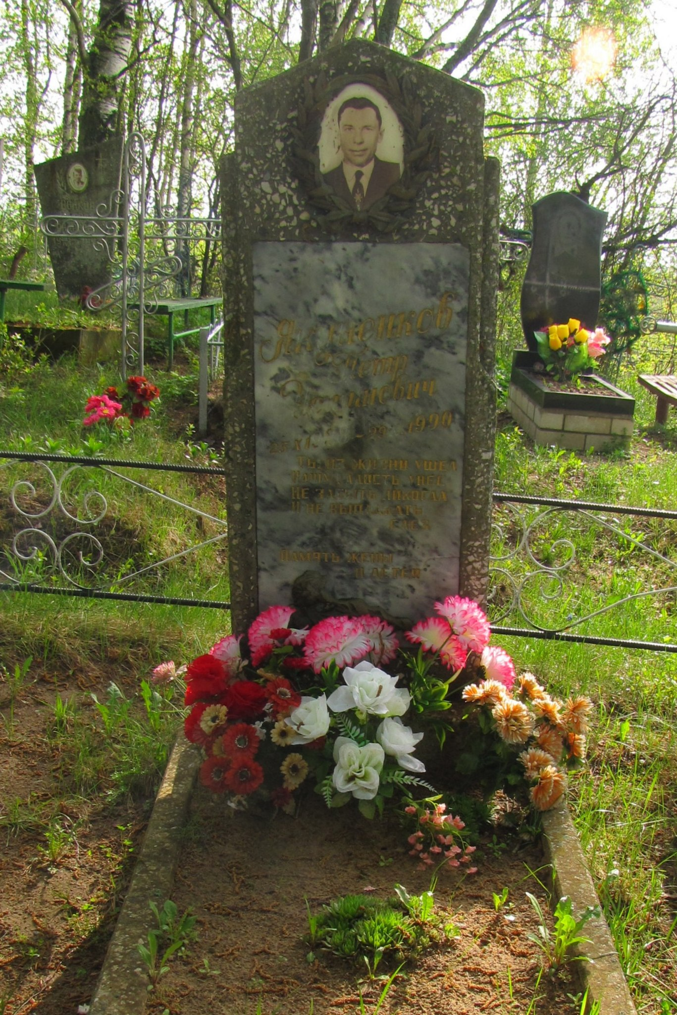 Могила Героя Социалистического Труда Петра Якуненкова в деревне Высокая Жарь Руднянского района Смоленской области.